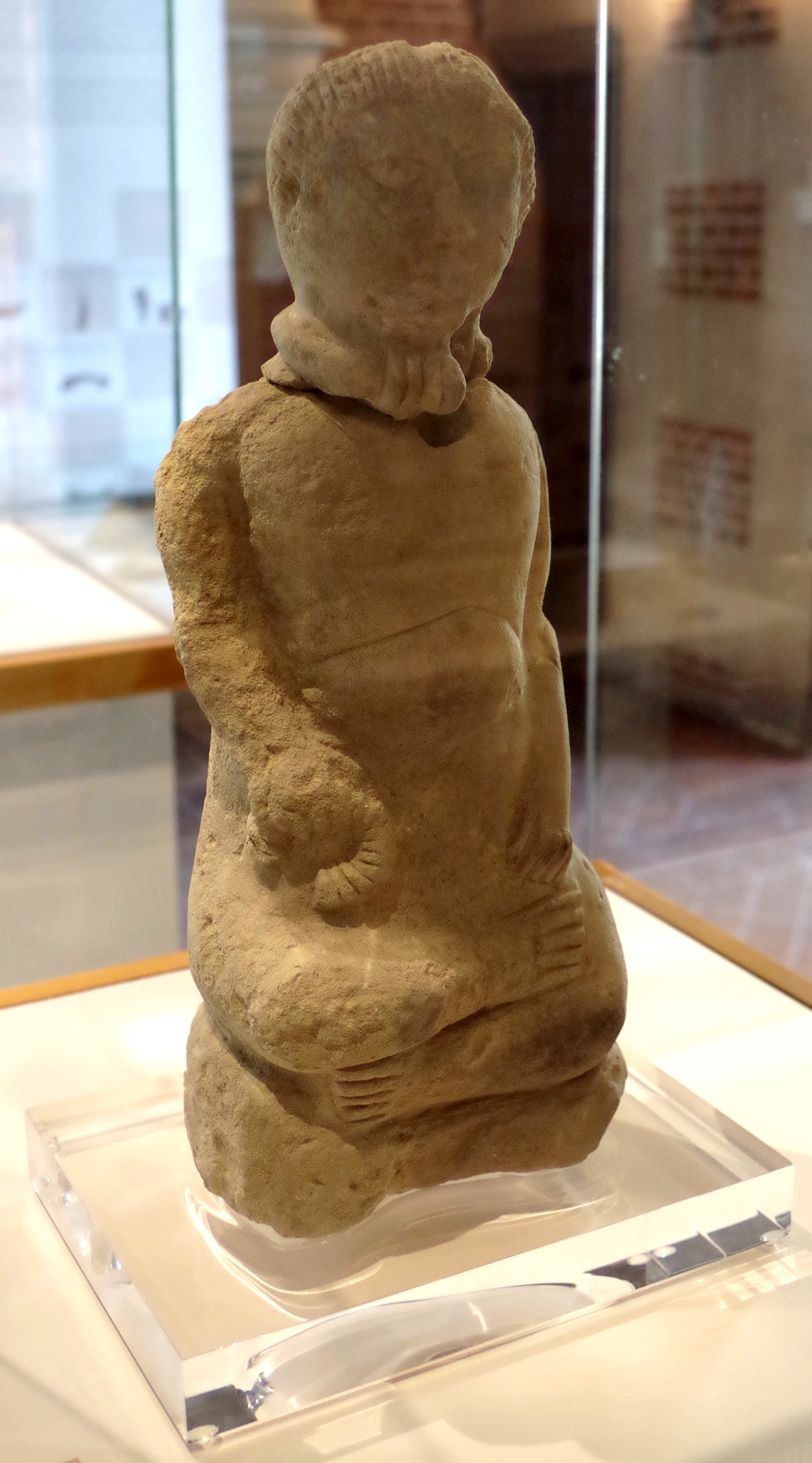 Statuette d' «assis en tailleur » nu trouvée à Amboise. Voir Jean-Marie Laruaz (dir.), Ambacia, la Gauloise - 100 objets racontent la ville antique d'Amboise, Chemillé-sur-Dême, Archéa, 2017, p. 116.